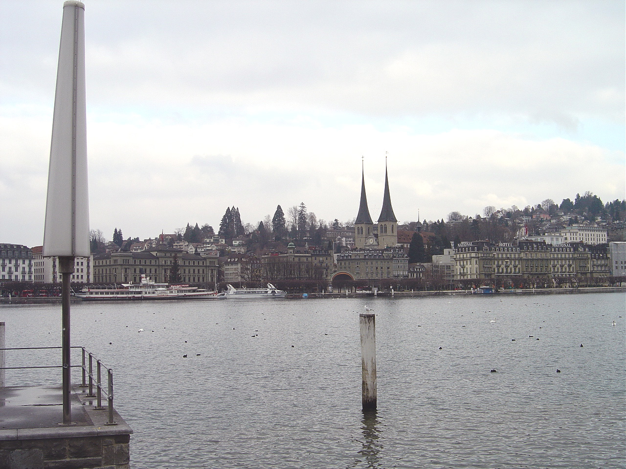 琉森湖（於琉森拍攝）。